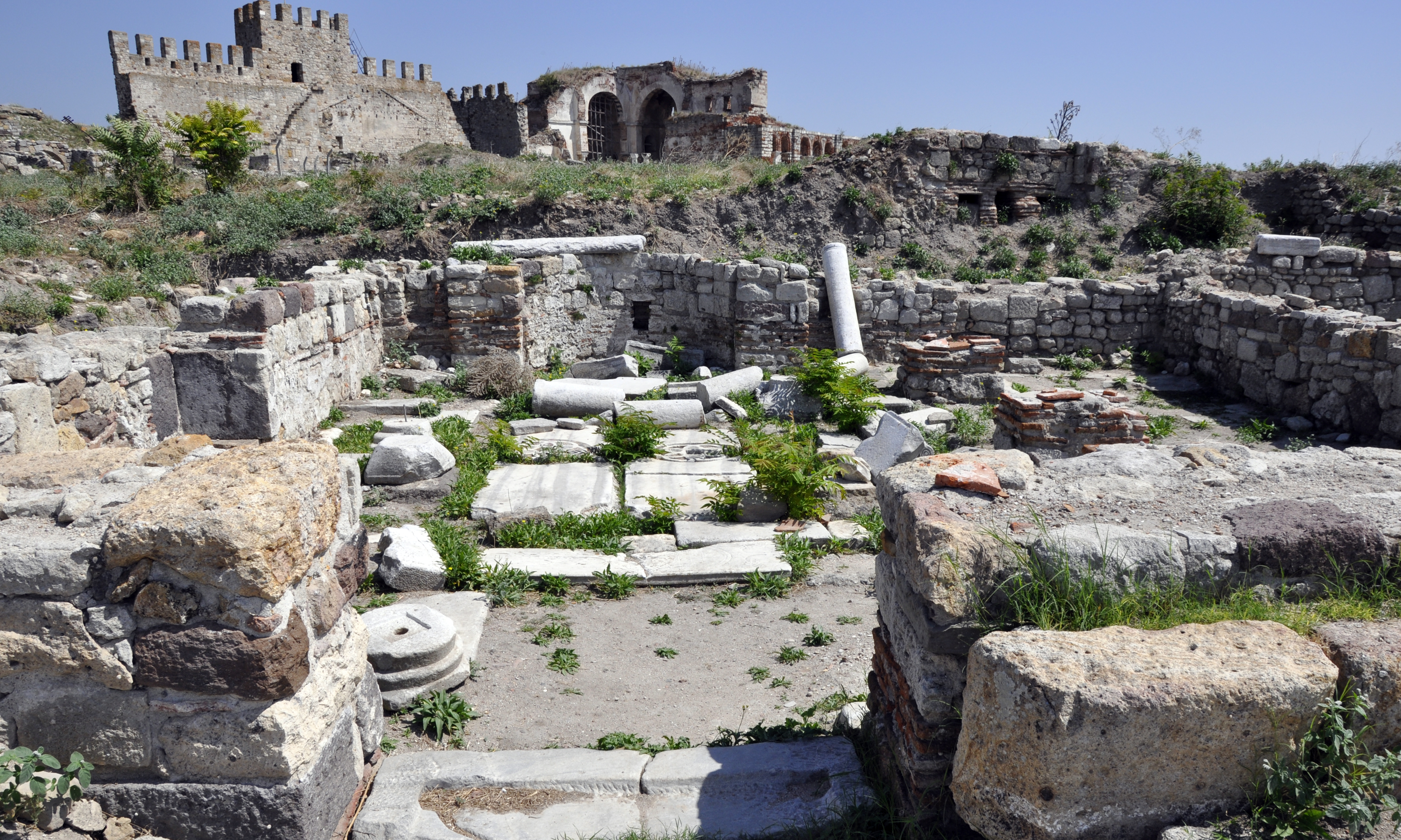 Enez/Edirne, Turkey